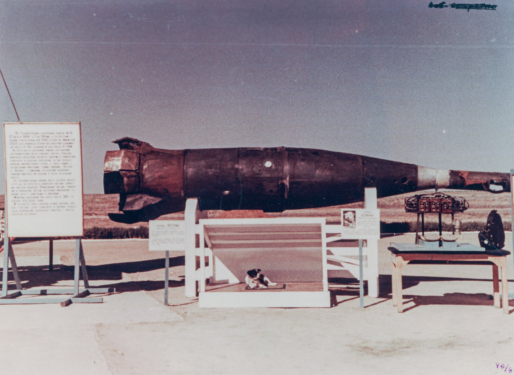 27 августа 1958 года состоялся второй в истории полет собак на ракете Р-5А. Полет на рекордную высоту в 453 км совершили собаки Белянка и Пестрая.